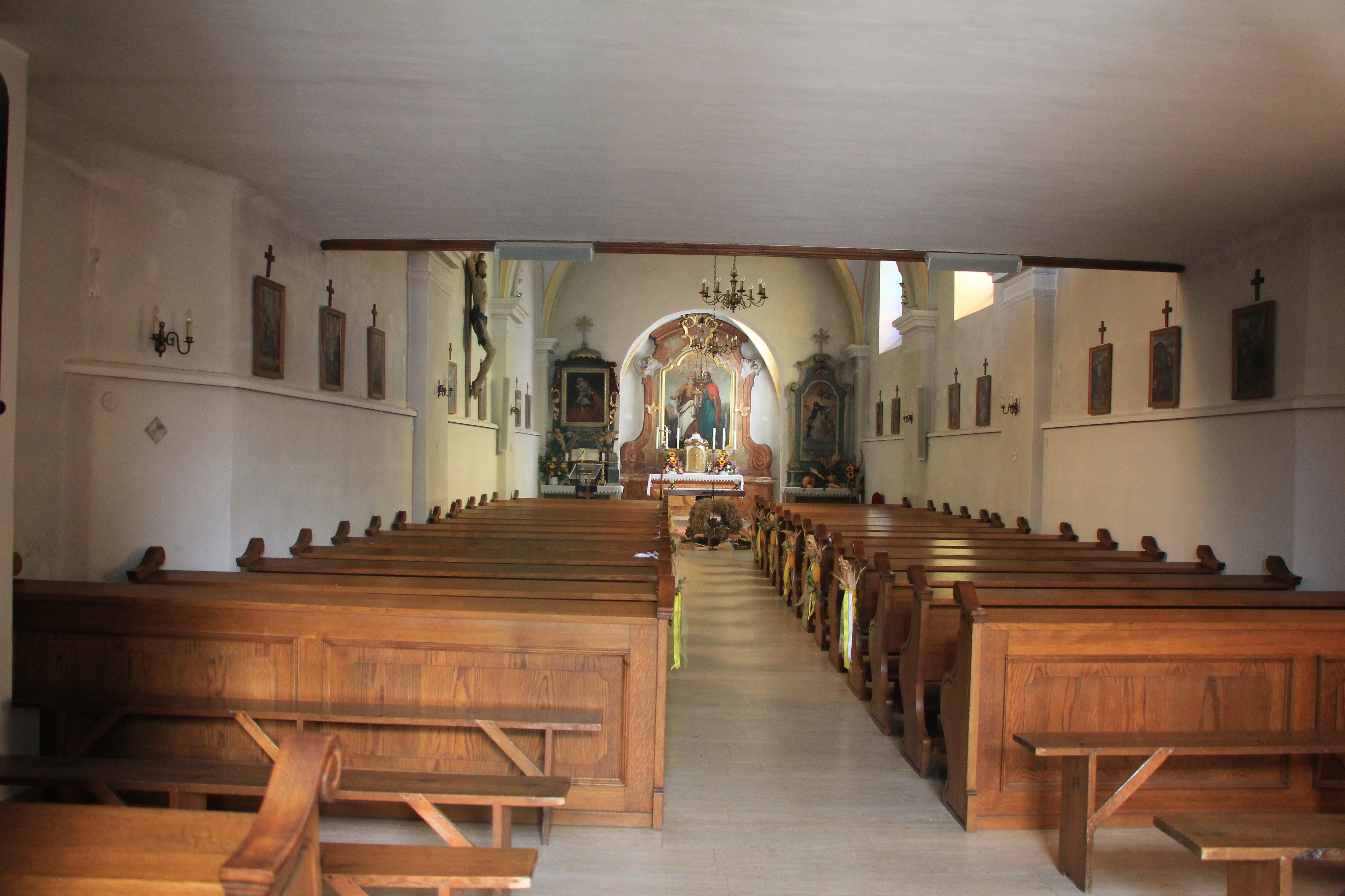 Blick ins Innere Pfarrkirche Gramatneusiedl